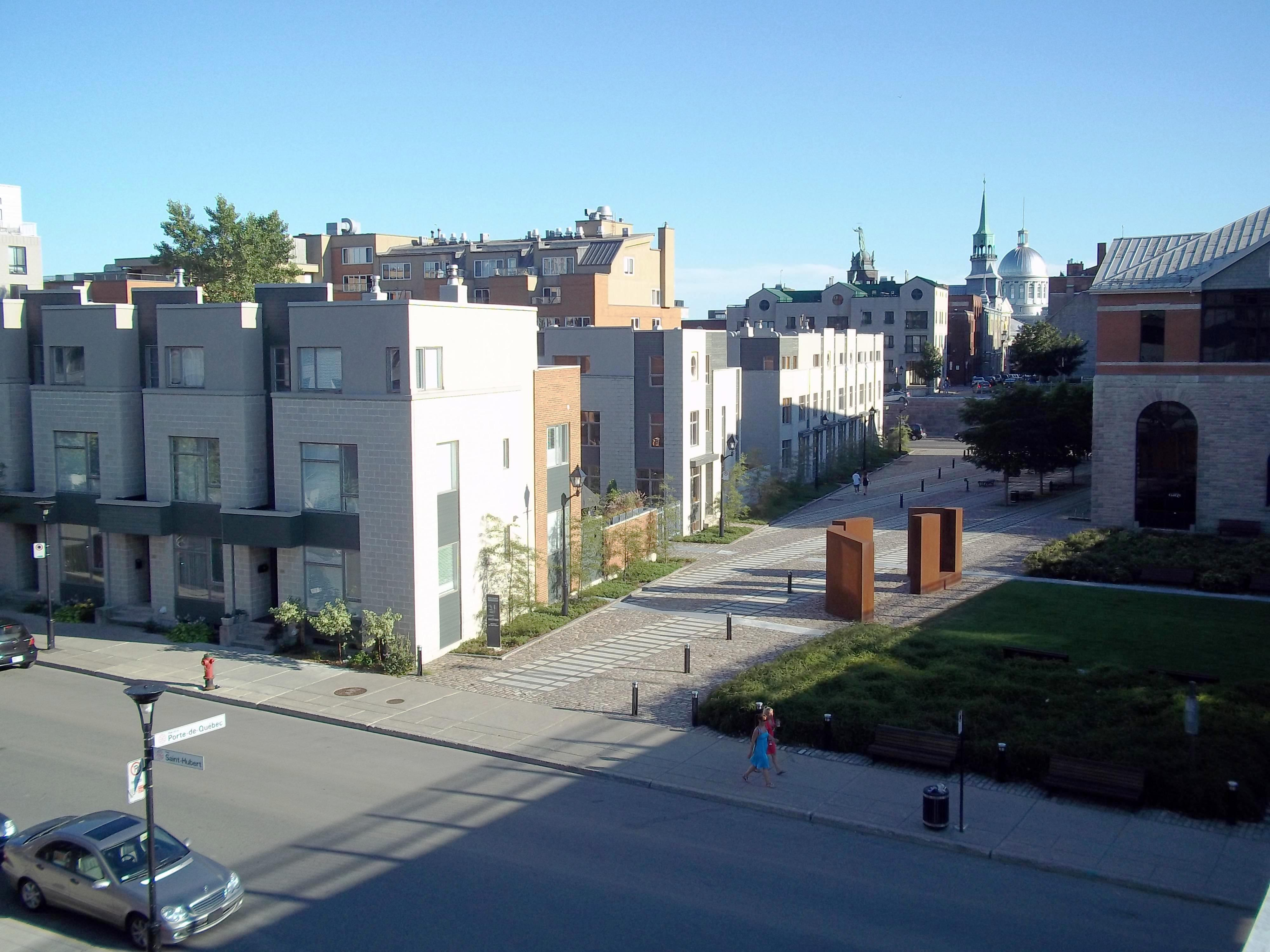 Le square Dalhousie vu du viaduc de la rue Notre-Dame à Montréal. info